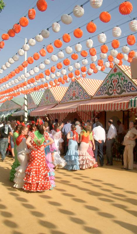 Feria de Abril (Sevilla), mujeres con traje de sevillanas, farolillos y casetas al fondo.